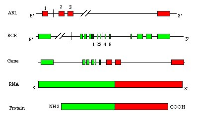 ABL-BCR Fusion gene